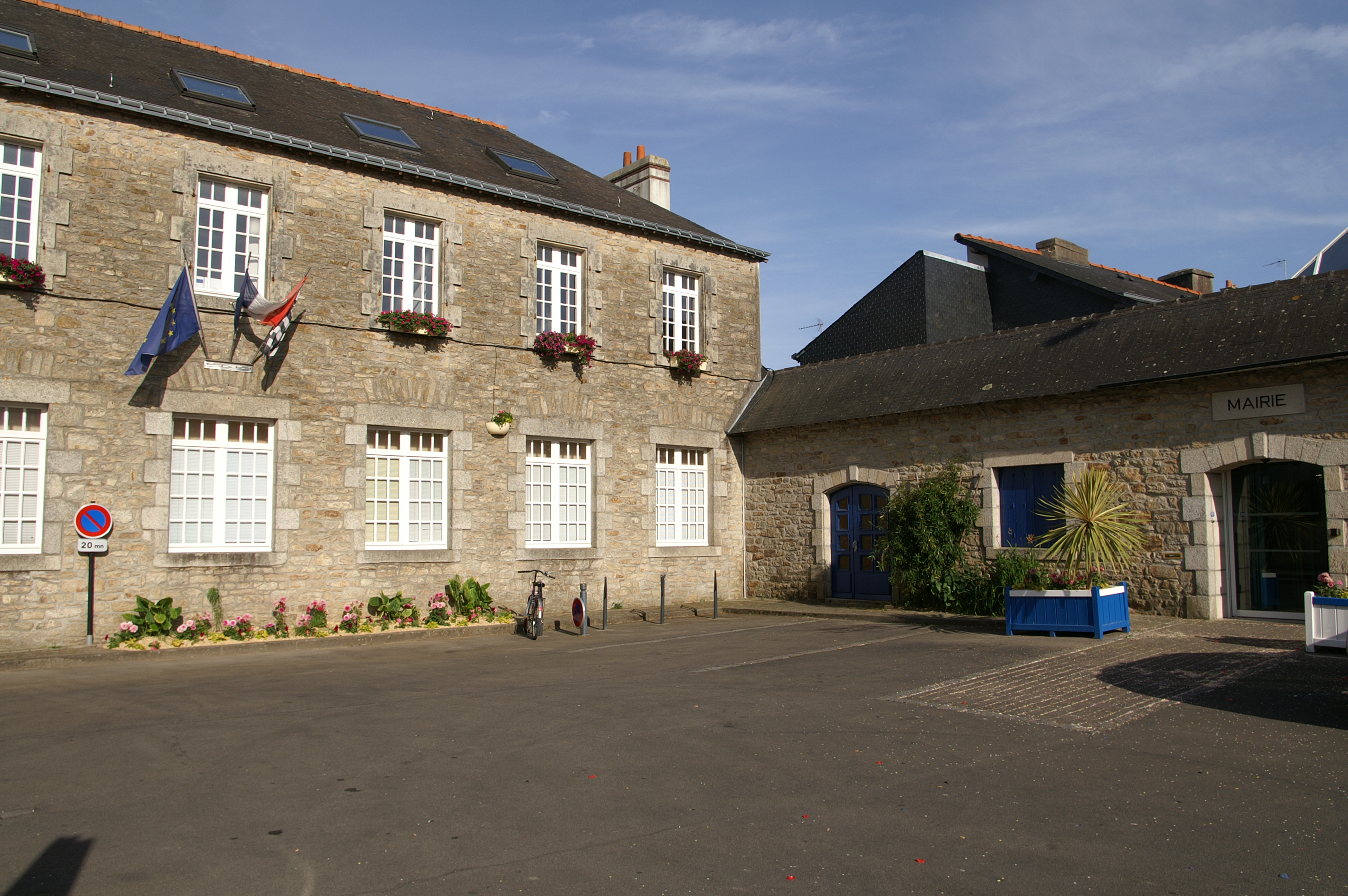 Mairie de Ploemeur.